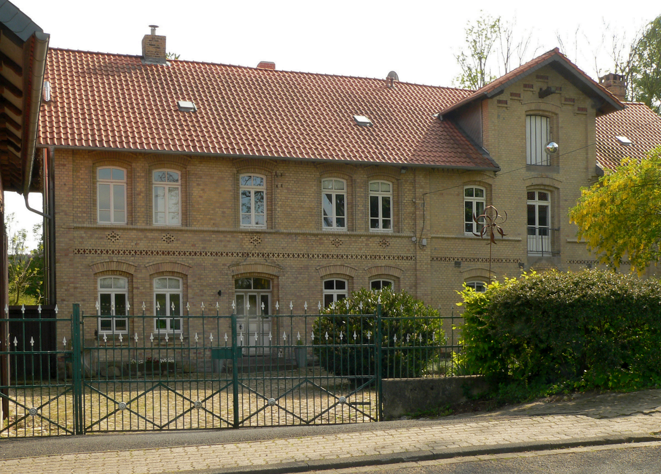 Amtsmühle